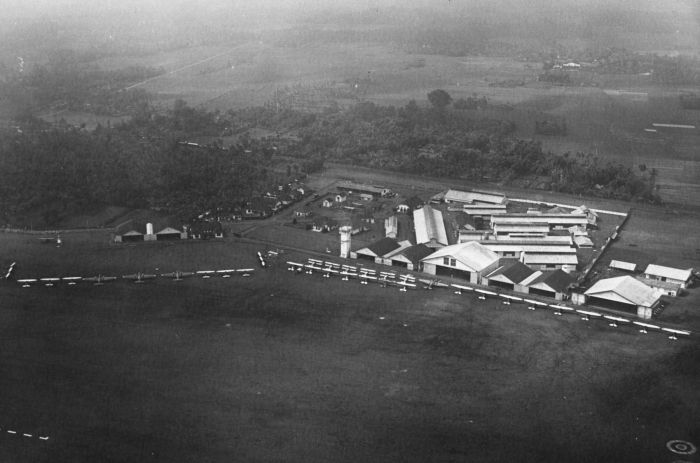 Foto. Luchtfoto van het militaire vliegveld Andir bij Bandoeng, met de, ter gelegenheid van het eerste bezoek van de nieuwe Gouverneur-Generaal, op een rij opgestelde vliegtuigen van het KNIL